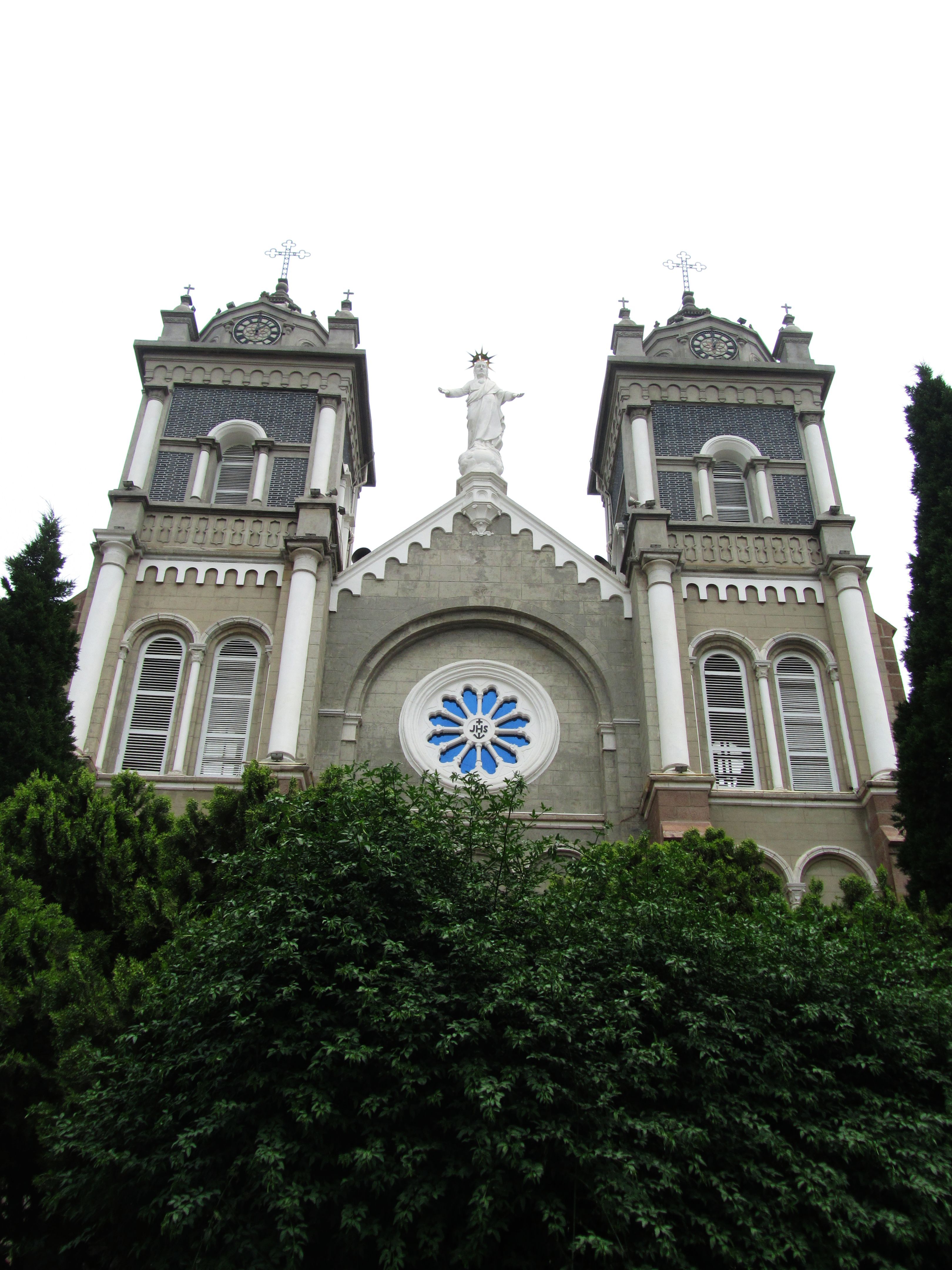 芜湖吉和街28号圣若瑟主教座堂。